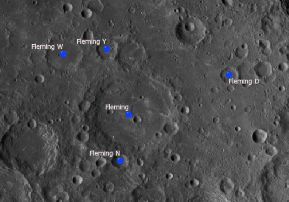 Cráter lunar Fleming. Cráteres satélite. (Imagen LROC)